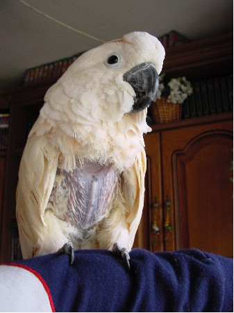 Anna Bauchansicht